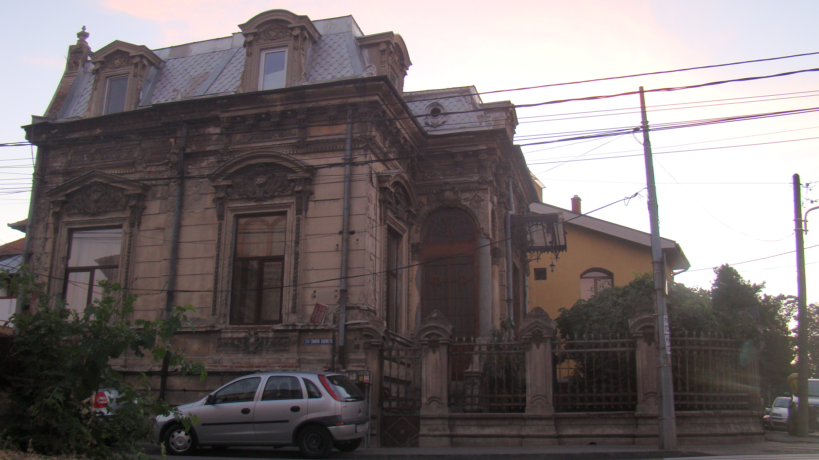 Casa Cănciulescu